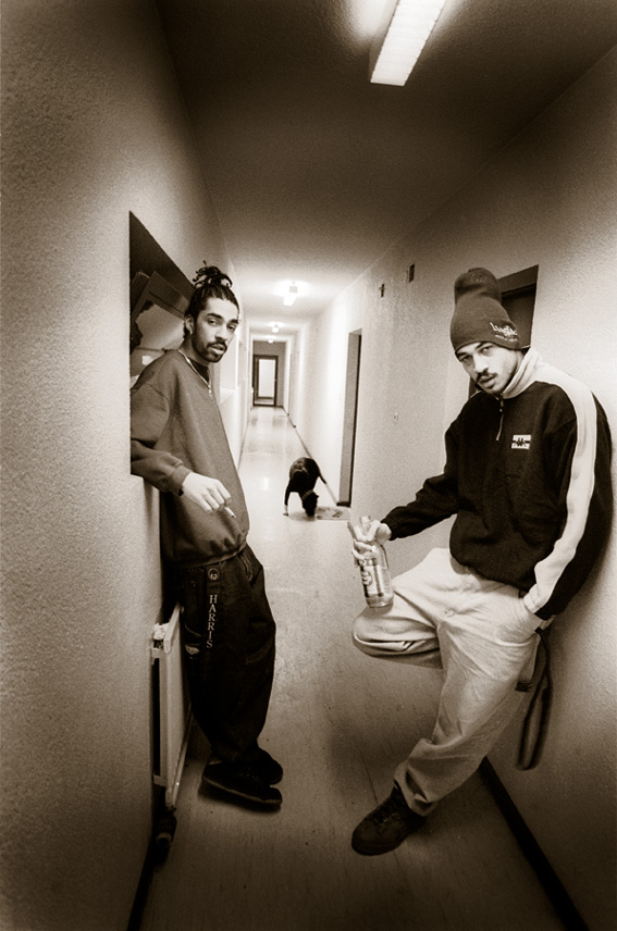 SPEZIALIZTZ: Harris und Dean